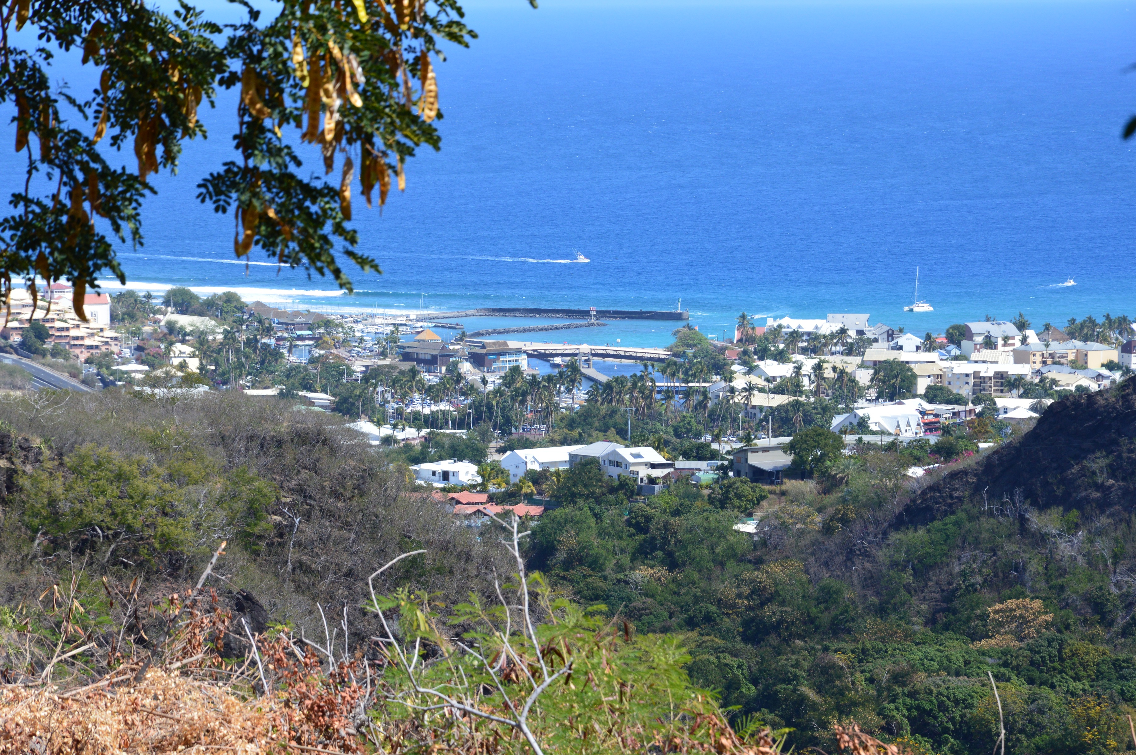 Zone balnéaire la plus réputée de l'île